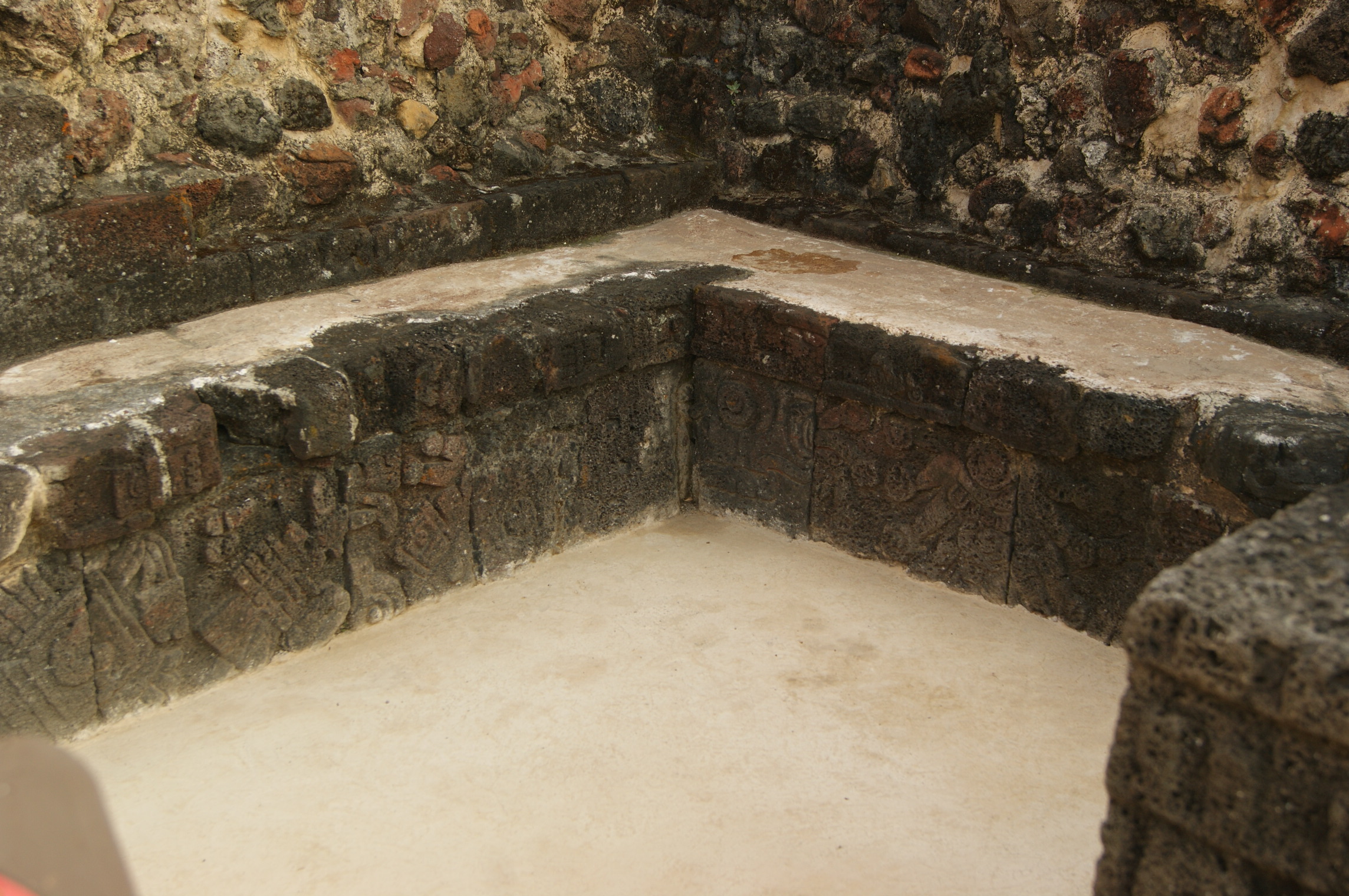 Zona Arqueológica el Tepozteco